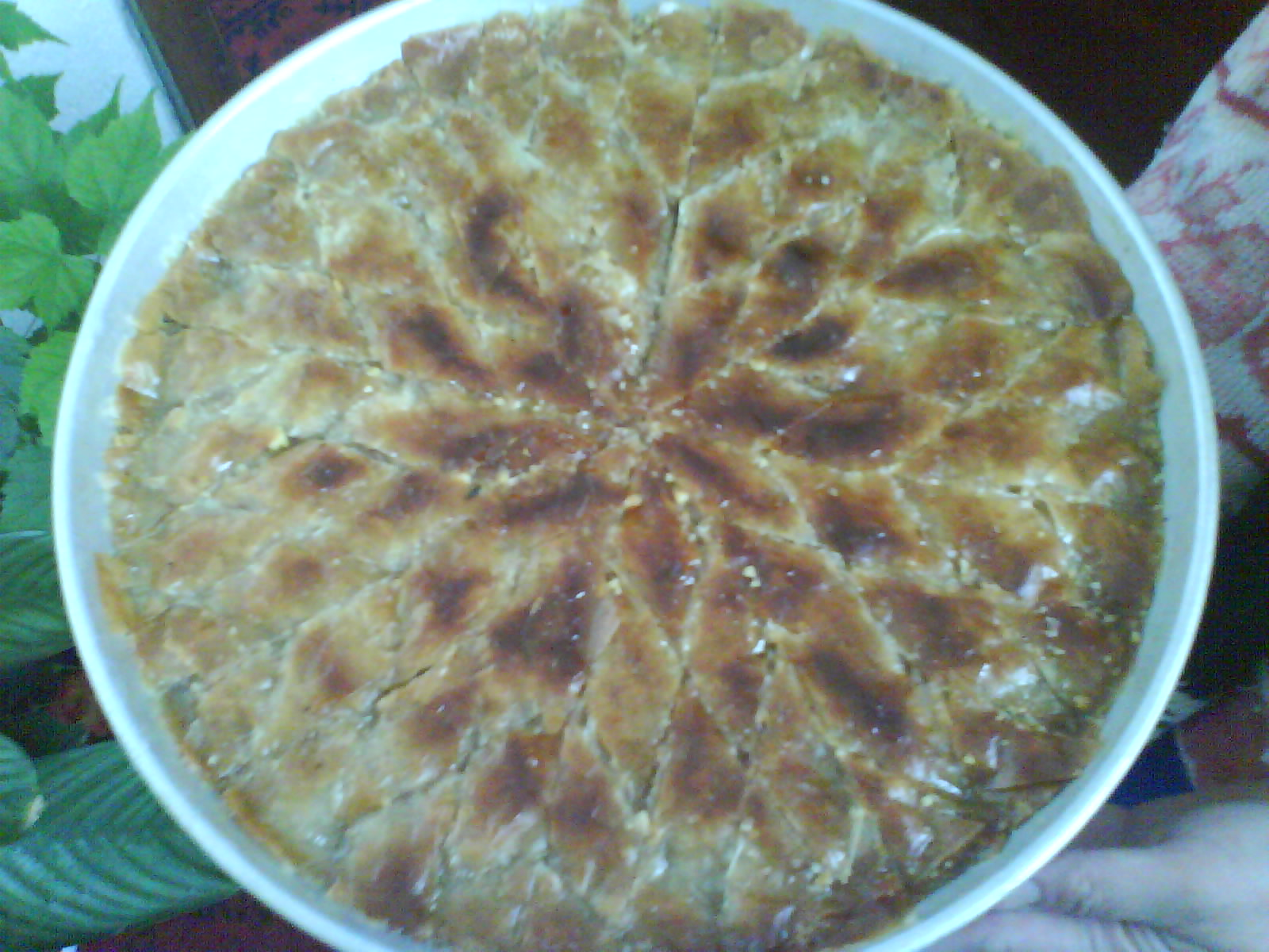 baklava